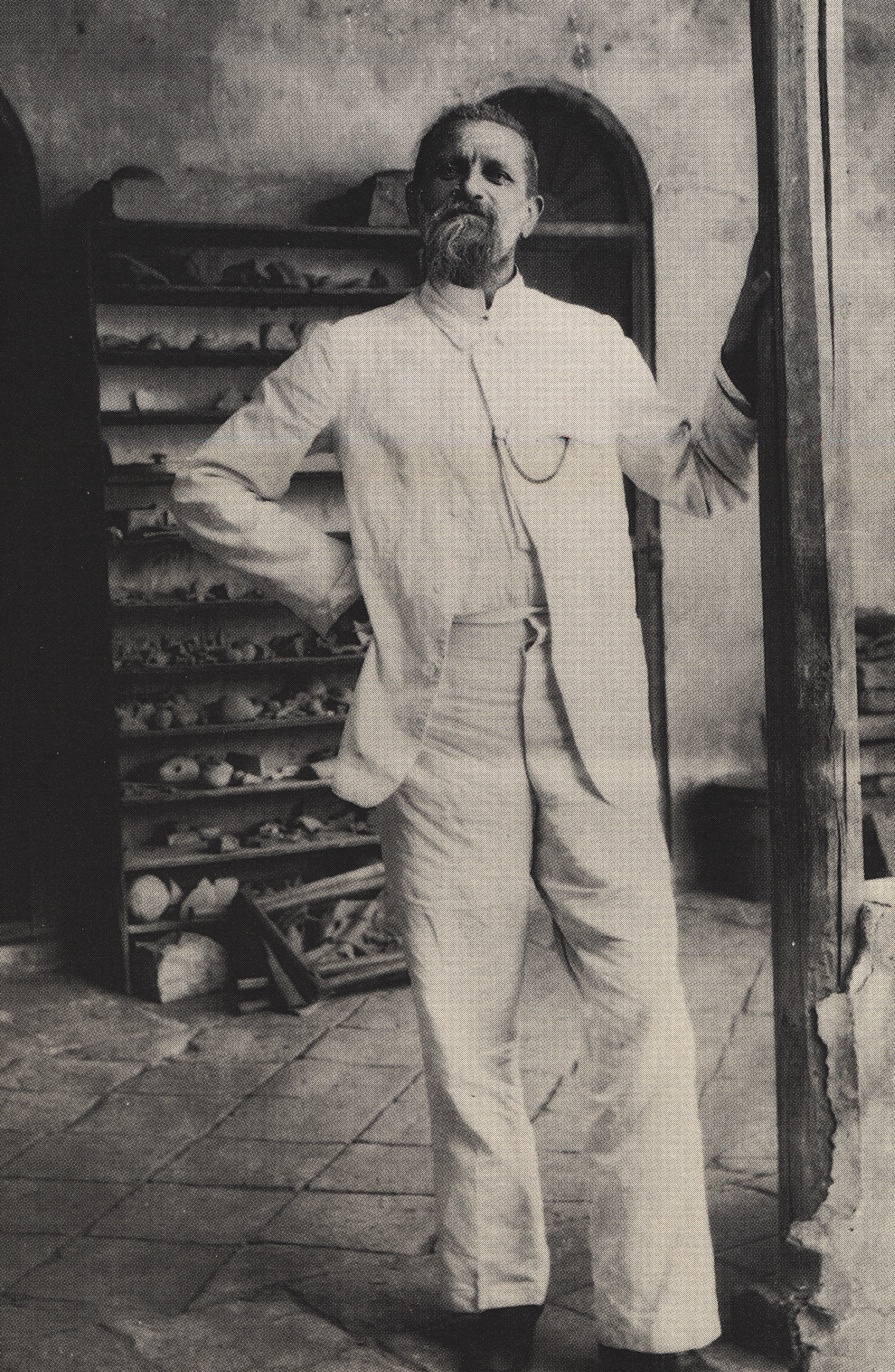 Robert Koldewey (1855-1925), Archäologe, in seinem Magazin in Babylon.